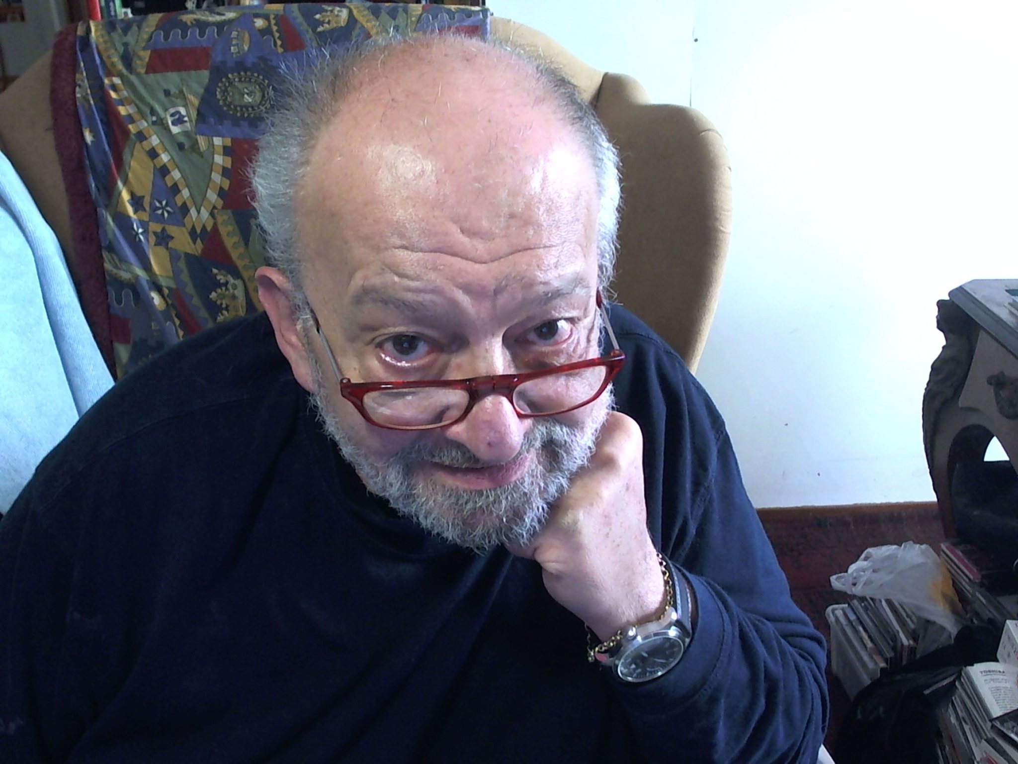 Immagine del giornalista e critico musicale Piergiuseppe Caporale (messa a disposizione dallo stesso soggetto)